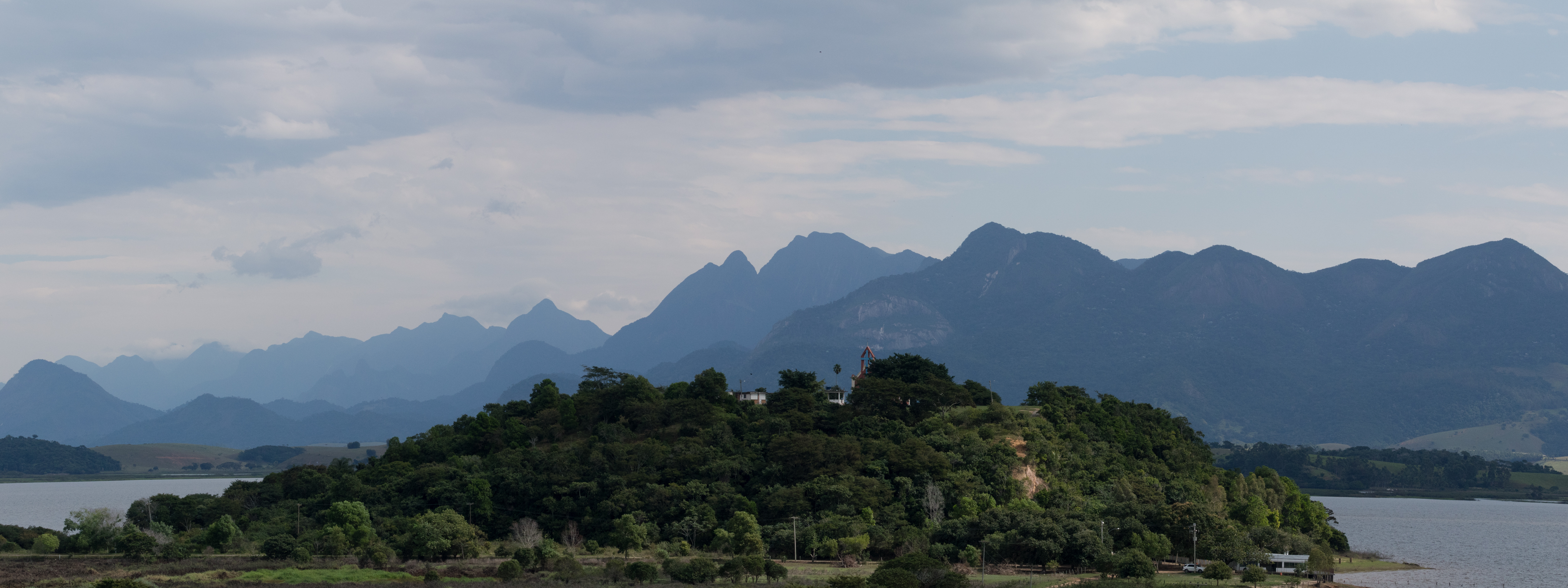 Da direita para a esquerda temos Pico do Aleluia, Serra das 5 Pontas, Pico da Babilônia, Serra das Almas,entre outros. E compondo a foto a Lagoa de Cima, entorno do Parque.